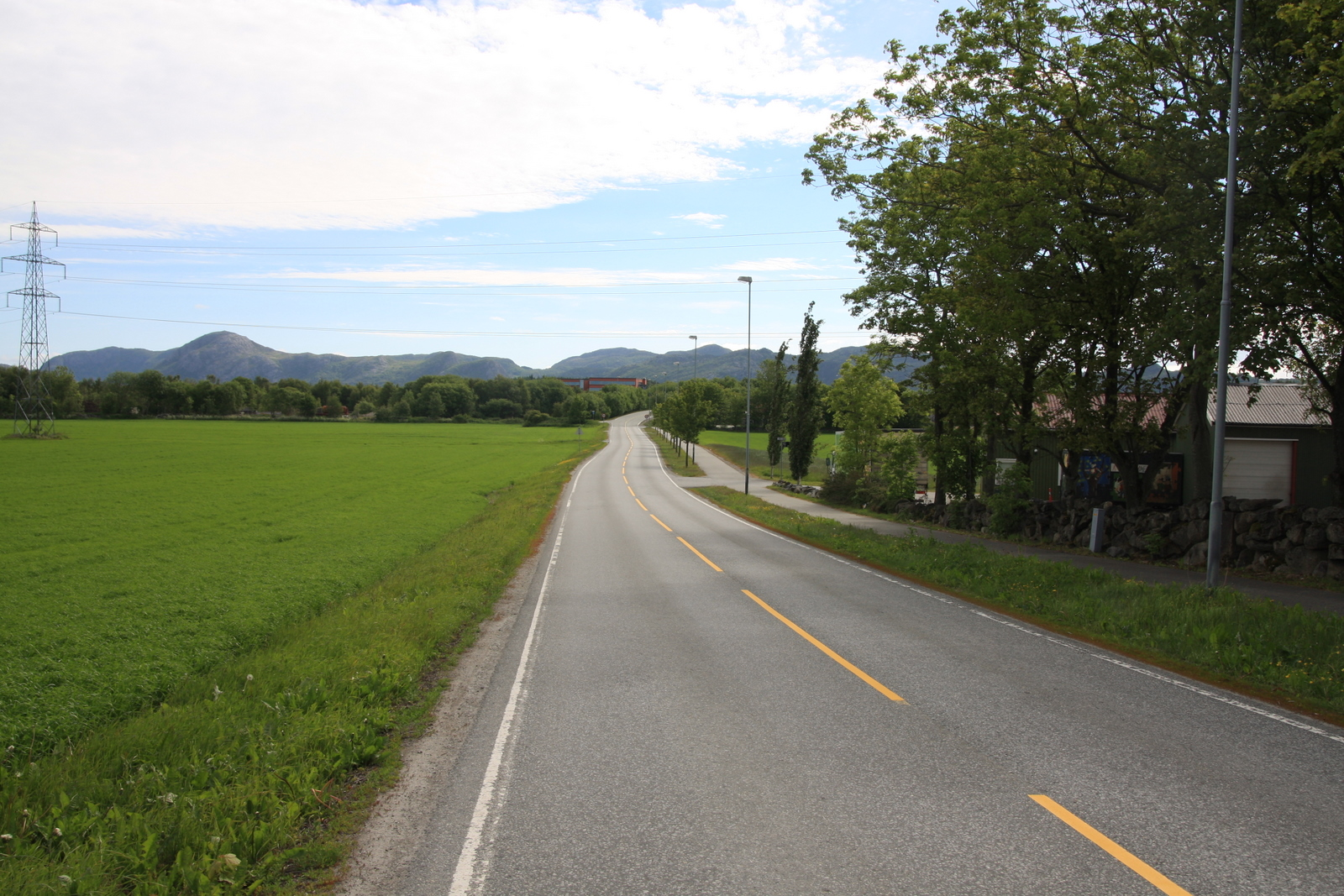 Fylkesvei 328 Somaveien